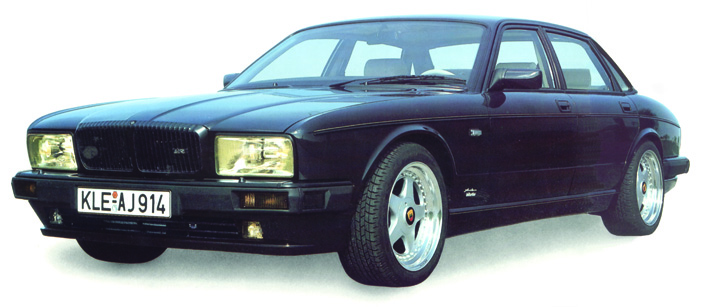 1988 entstand der Arden AJ 5 Biturbo basierend auf dem Jaguar XJ 40 Arden Werksfoto Fotograf Heinz Holzbach